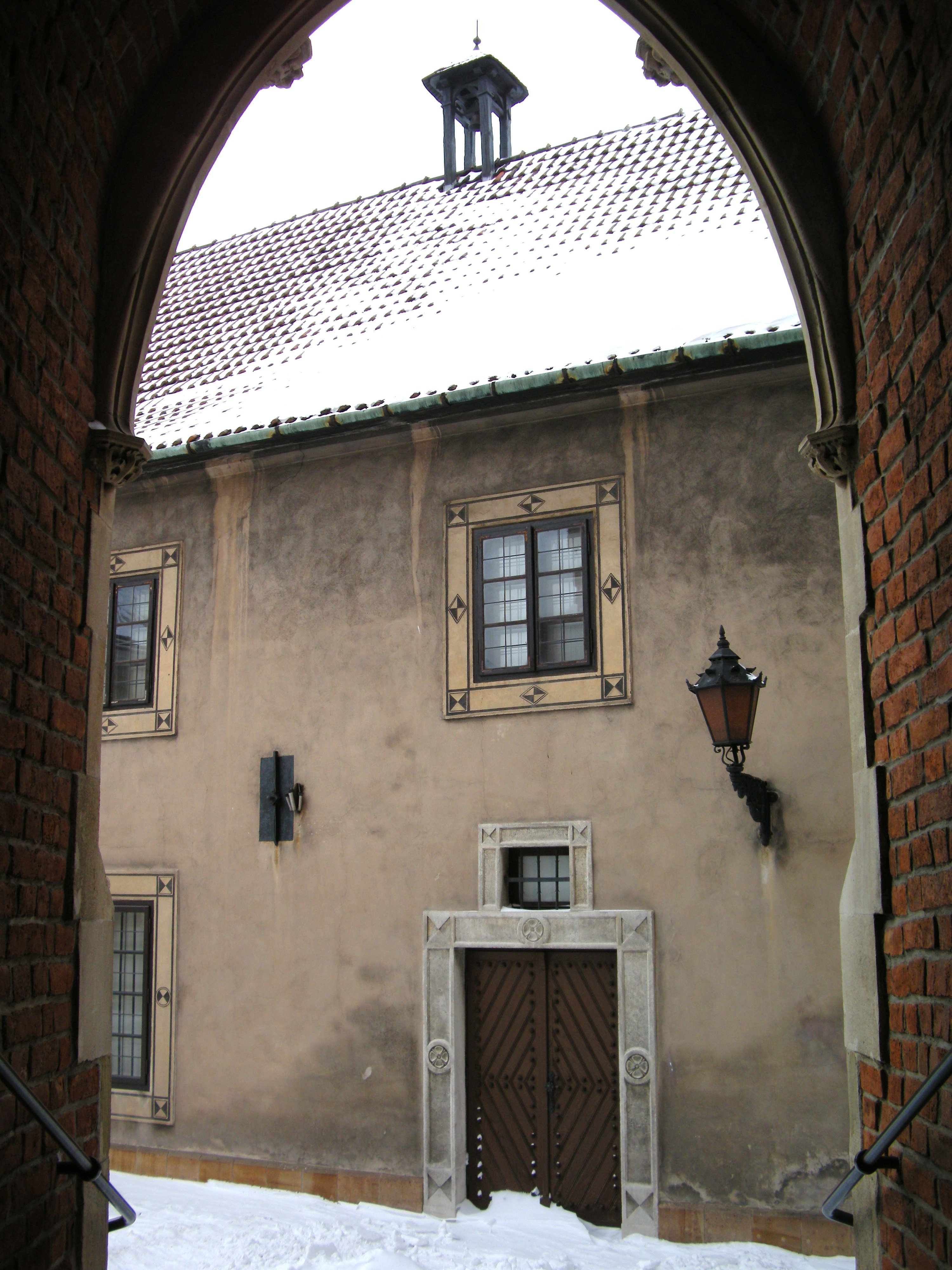 Dawna szkoła parafialna. Obecnie Muzeum Diecezjalne